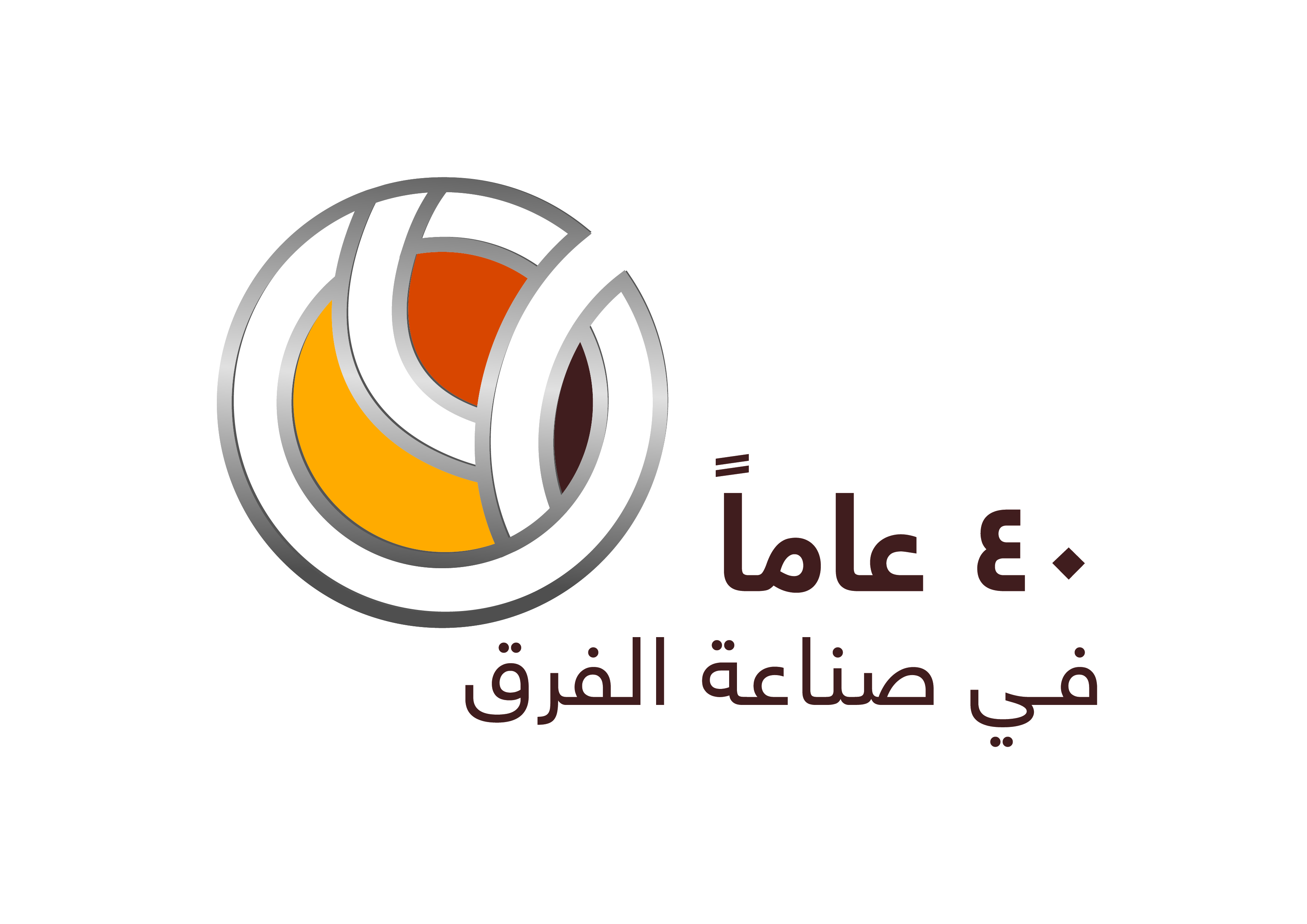 شعار بمناسبة مرور 40 عاماً على تأسيس الهيئة الملكية للجبيل وينبع